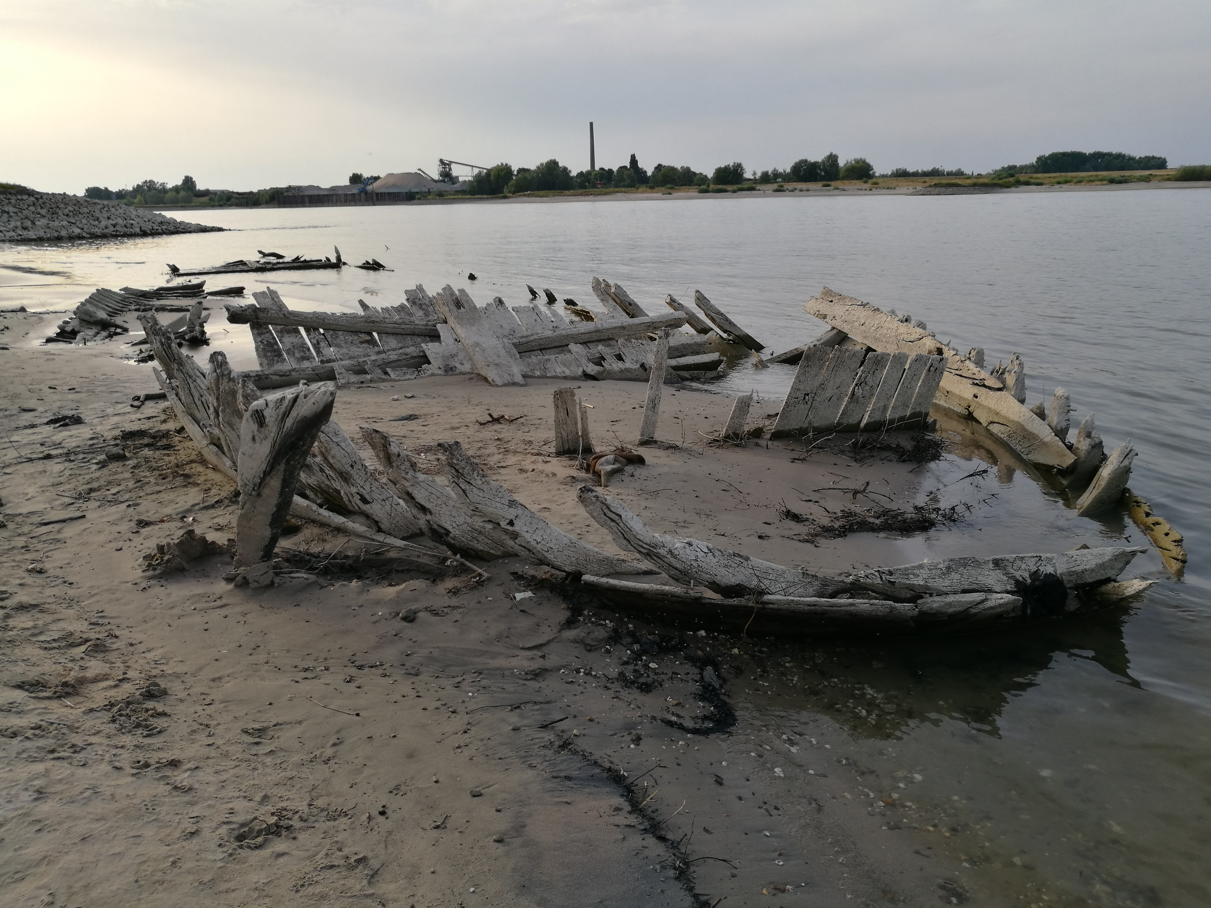 Wrack der De Hoop im Rhein bei Niedrigwasser